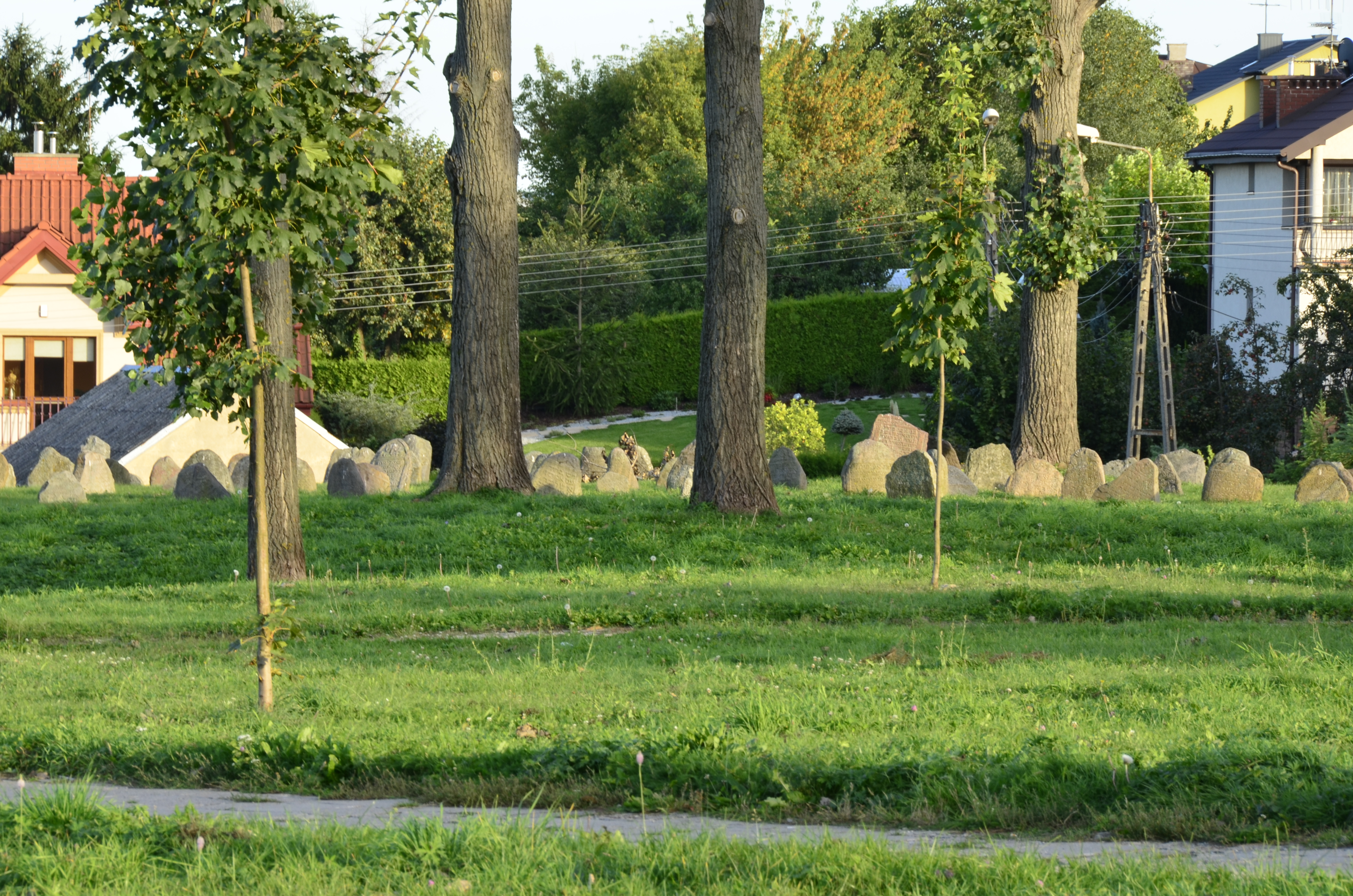 Cmentarz żydowski „stary” Łomża ul. Woziwodzka - Rybaki - pl. Zielony, Łomża